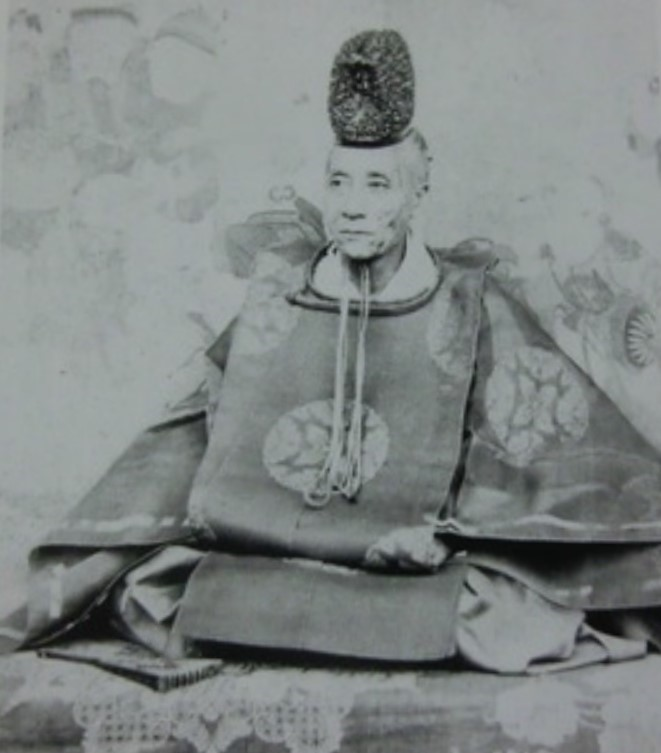 松平頼胤の肖像写真。